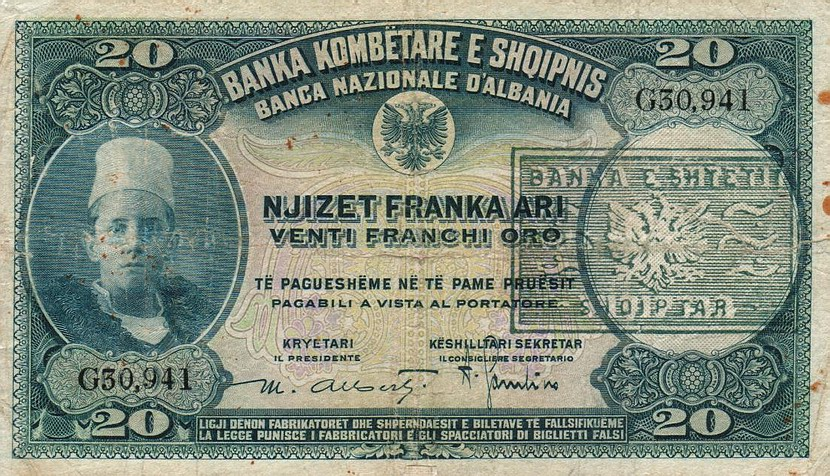 20 Golden Franks 1945